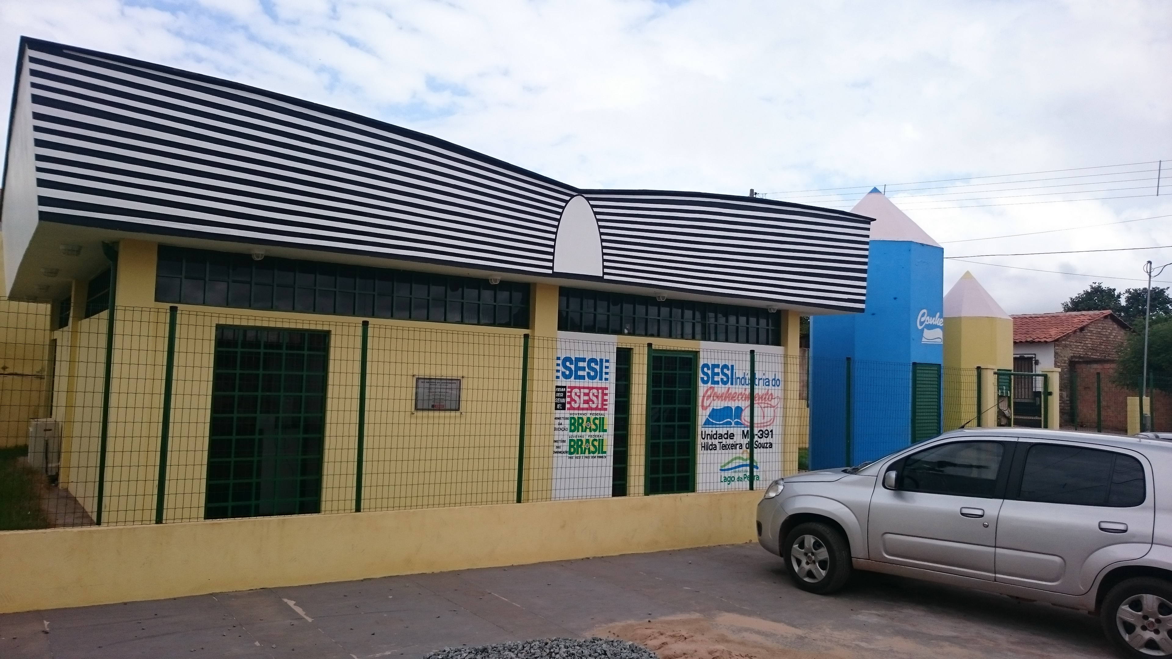 Unidade Sesi Indústria do Conhecimento - Lago da Pedra